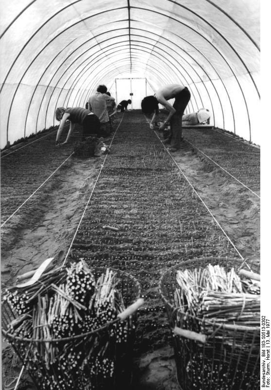 Berlin, Blick in eine Baumschule Zum Beitrag: Eine grüne Quelle für gute Berliner Luft - Zwischen Rosencontainern, Zier- und Nadelhölzen in Baumschulenweg ADN-ZB Sturm 13.5.1977-ha. Unter dem Folienzelt gedeihen anspruchsvolle Steckhölzer besonders gut. Die Berliner Baumschule ist mit ihren 100 Hektar Fläche eine der größten der DDR und gehört als Betriebsteil zum VEG Saatzucht Baumschulen Dresden. Umfangreiche Aufgaben erwachsen dem Kollektiv der Baumschule aus dem anspruchsvollen Wohnungsbauprogramm, das in der Hauptstadt realisiert wrid, denn die Neubaugebiete müssen auch mit entsprechenden Grünflächen und Bäumen gestaltet werden. (Bitte beachten Sie hierzu auch S 0513-300 + 301 N - Ferner kann das Farbmotiv S 0510-406 N bei ZB zu diesem Beitrag abgefordert werden)